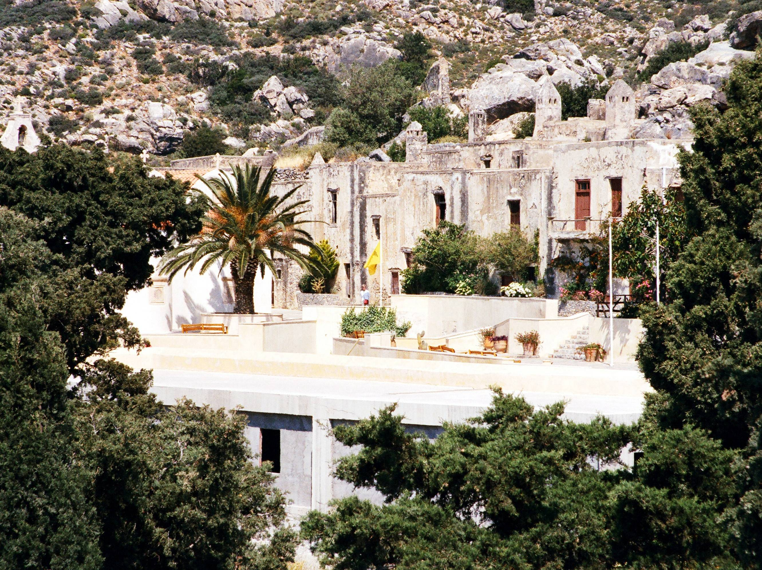 Mönchskloster Moni Preveli, Kreta (Griechenland)